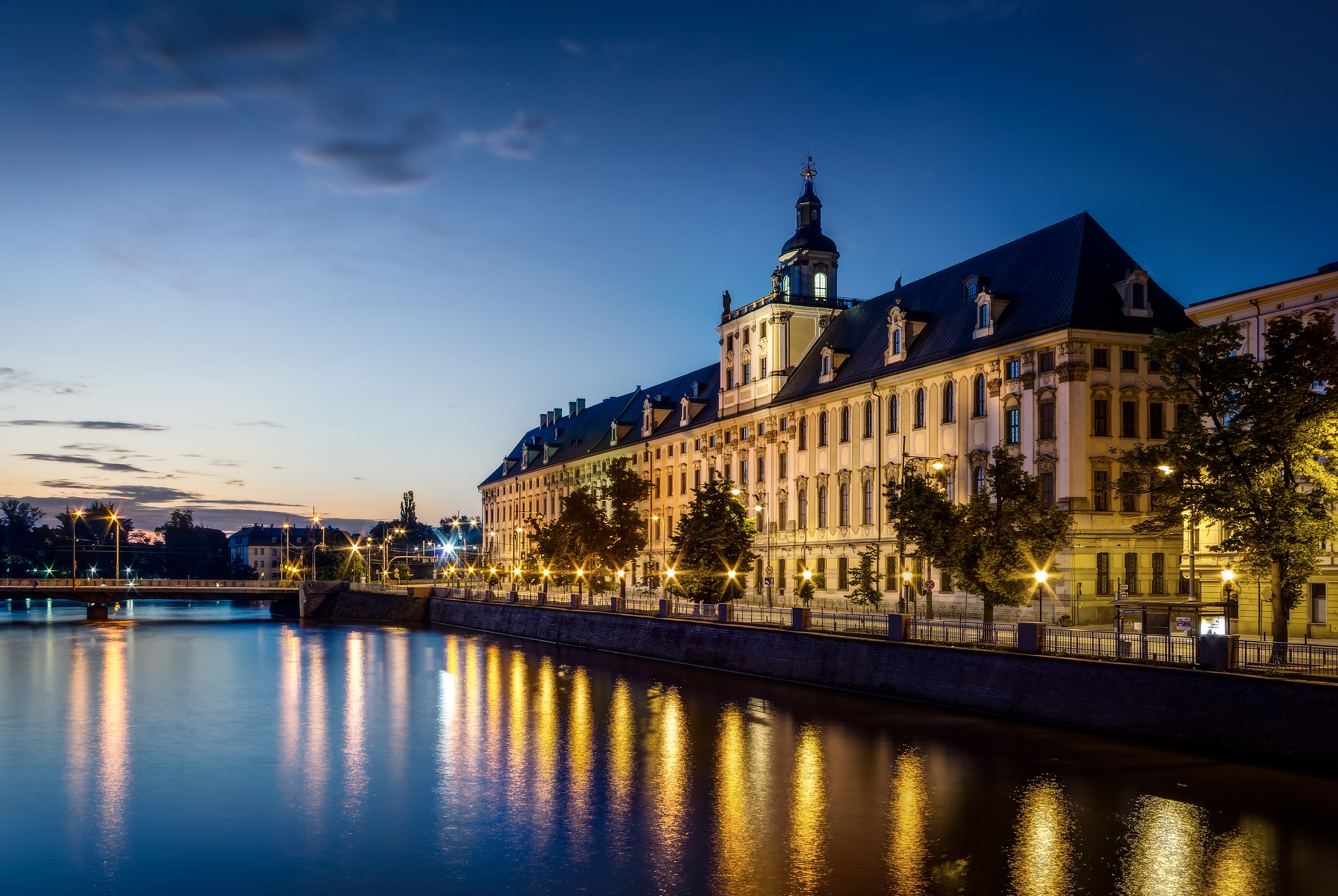 Wrocław, kolegium jezuickie, ob. Uniwersytet Wrocławski